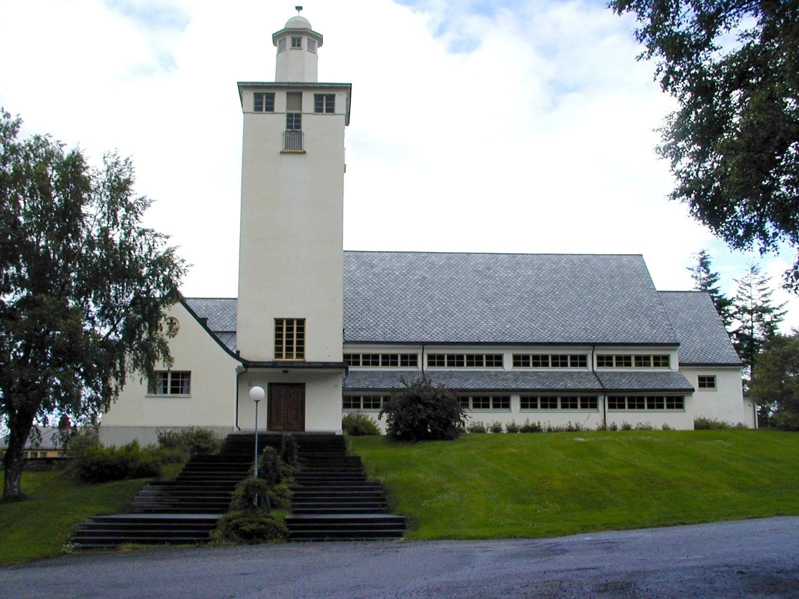 Langevåg kirke. Foto: Max Ingar Mørk. Fra Riksantikvarens Kulturminnesøk.